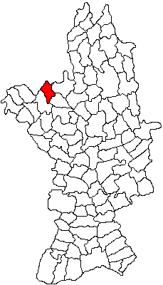 Categorie:Hărţi ale judeţului Olt